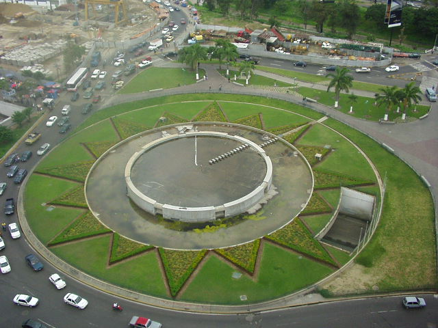 Plaza Venezuela. Libertador municipality, Capital District, Venezuela.